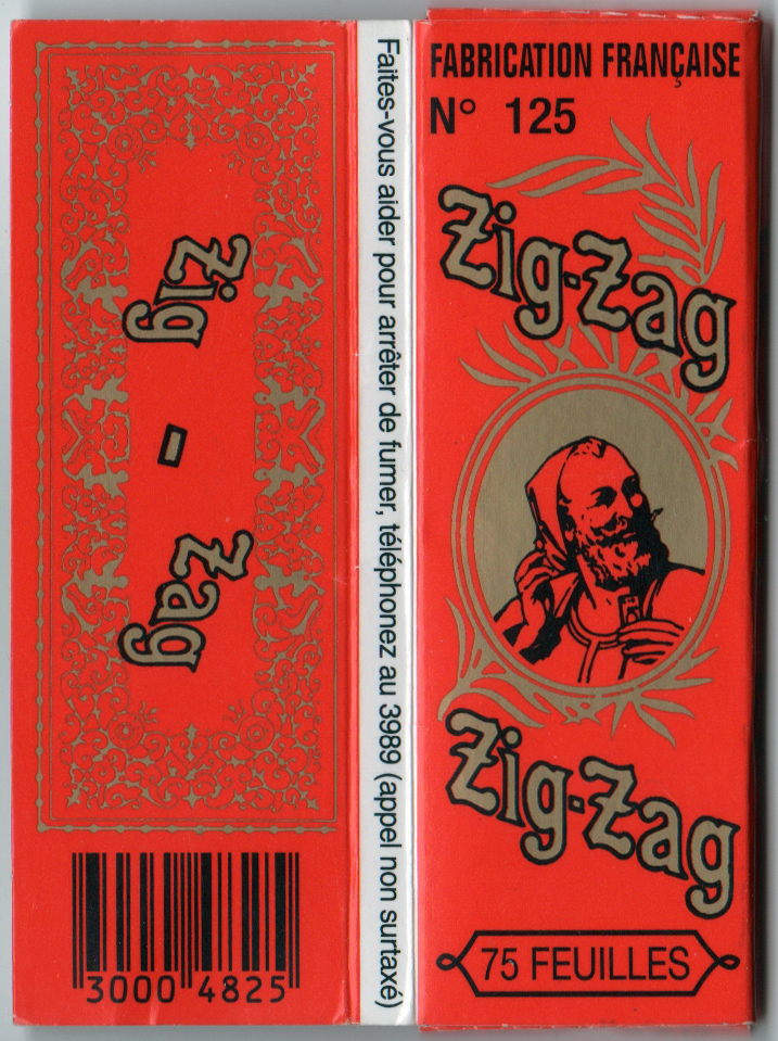 Carnet de feuilles Zig-Zag № 125 français.